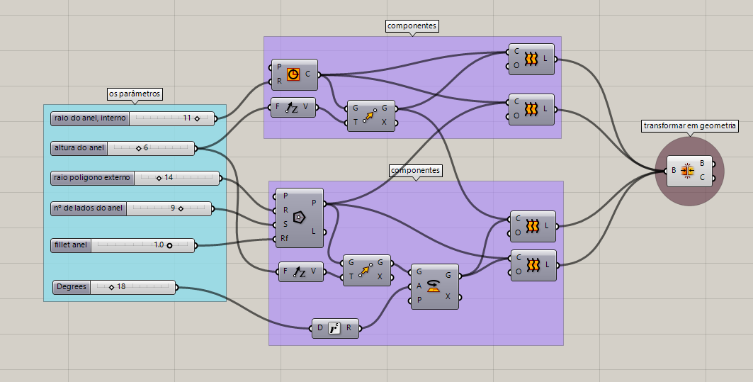 Ao lado esquerdo da definição estão os inputs, os componentes no centro se encarregam de fazer a operação matemática. Ao lado direito, os outputs (saídas). Se quiser interactuar com este exemplo, acesse